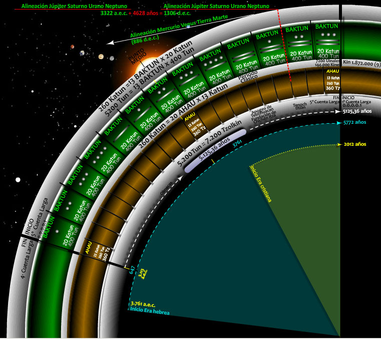 El Baktun está compuesto por 20 Katunes y es la 13ª parte de la Cuenta Larga que a la vez es la 5ª parte del Ciclo Maya completo. La imagen incluye las eras históricas hebrea y cristiana dentro de la pasada y última Cuenta Larga del pasado Gran ciclo maya.